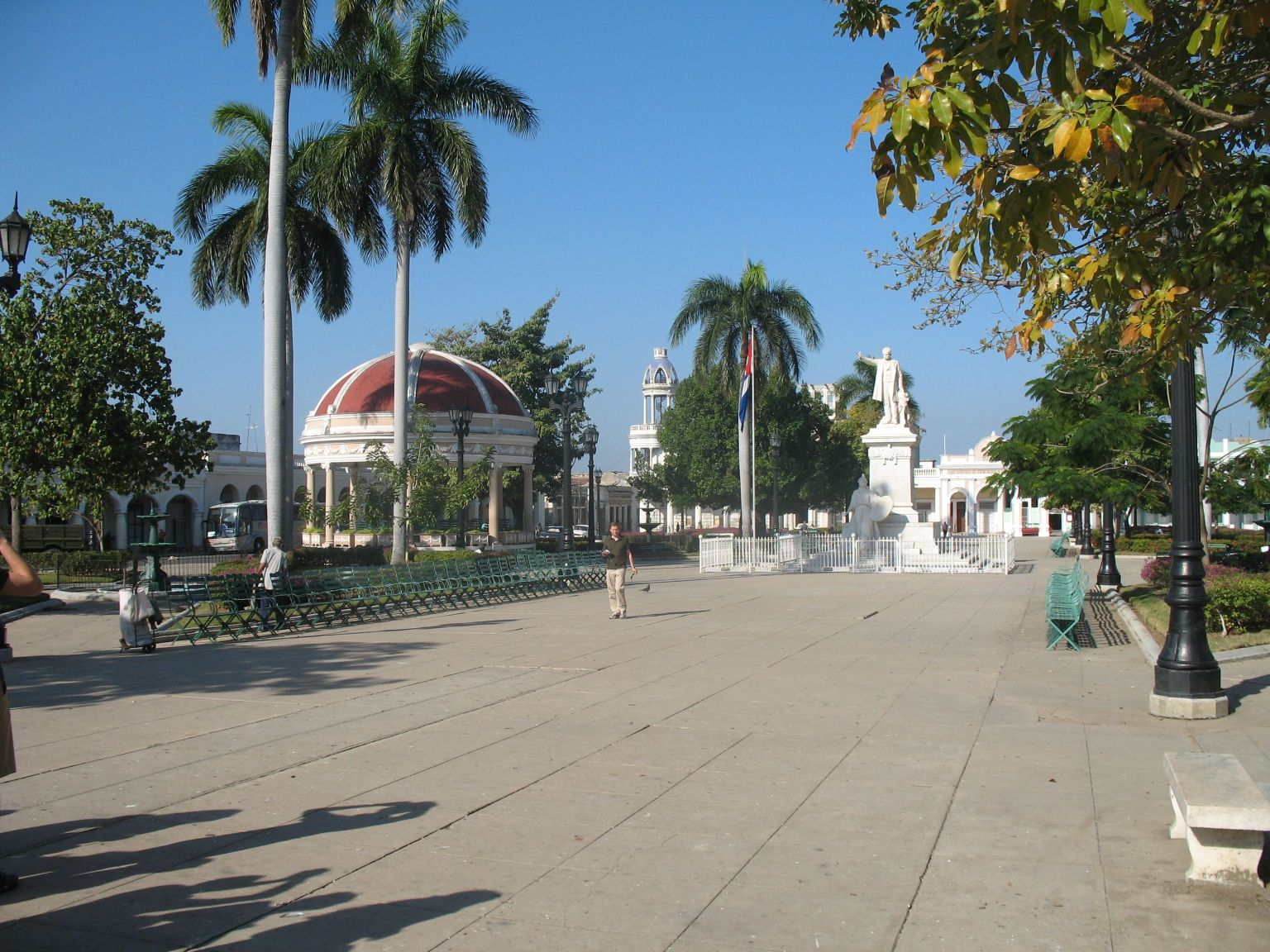 Cienfuegos Zentrum, Kuba